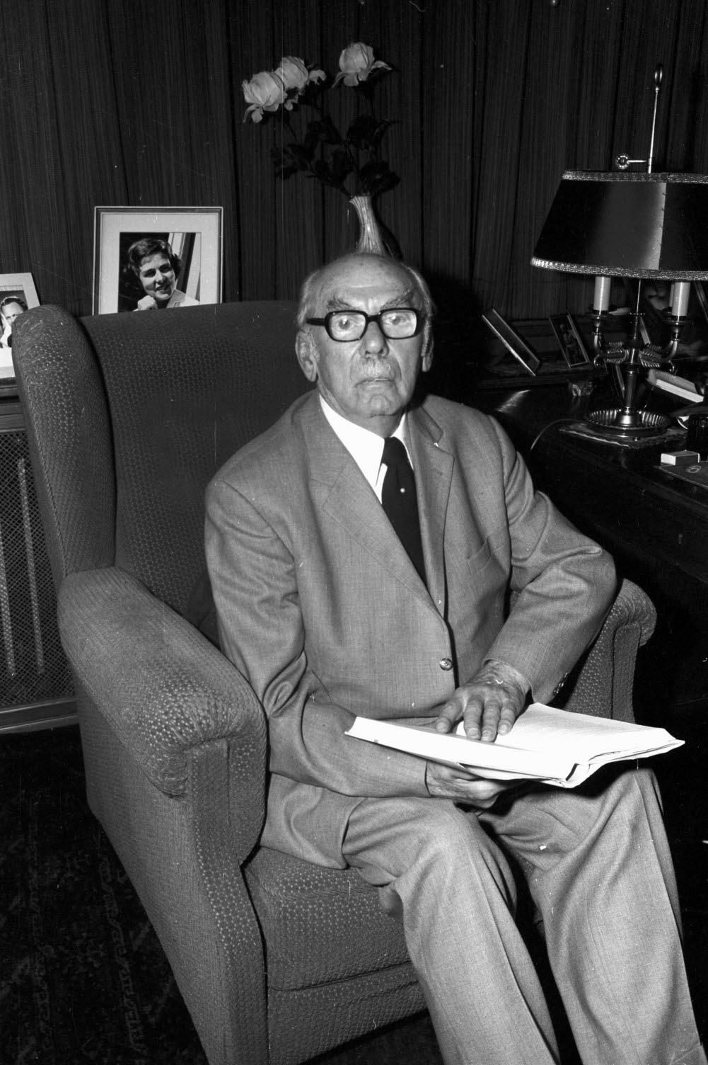 wird am 22. Juli 80 Jahre.